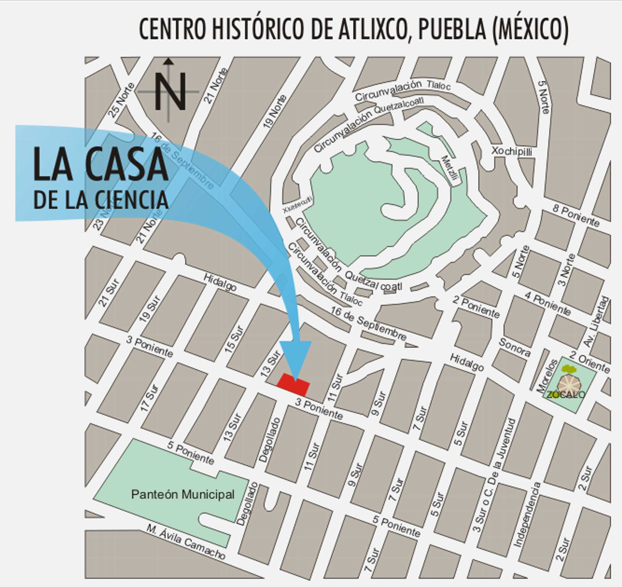 Mapa para llegar a La Casa de la Ciencia, en Atlixco, Puebla (México)